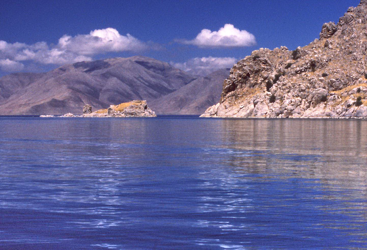 Vue du lac aux abords de l'île.